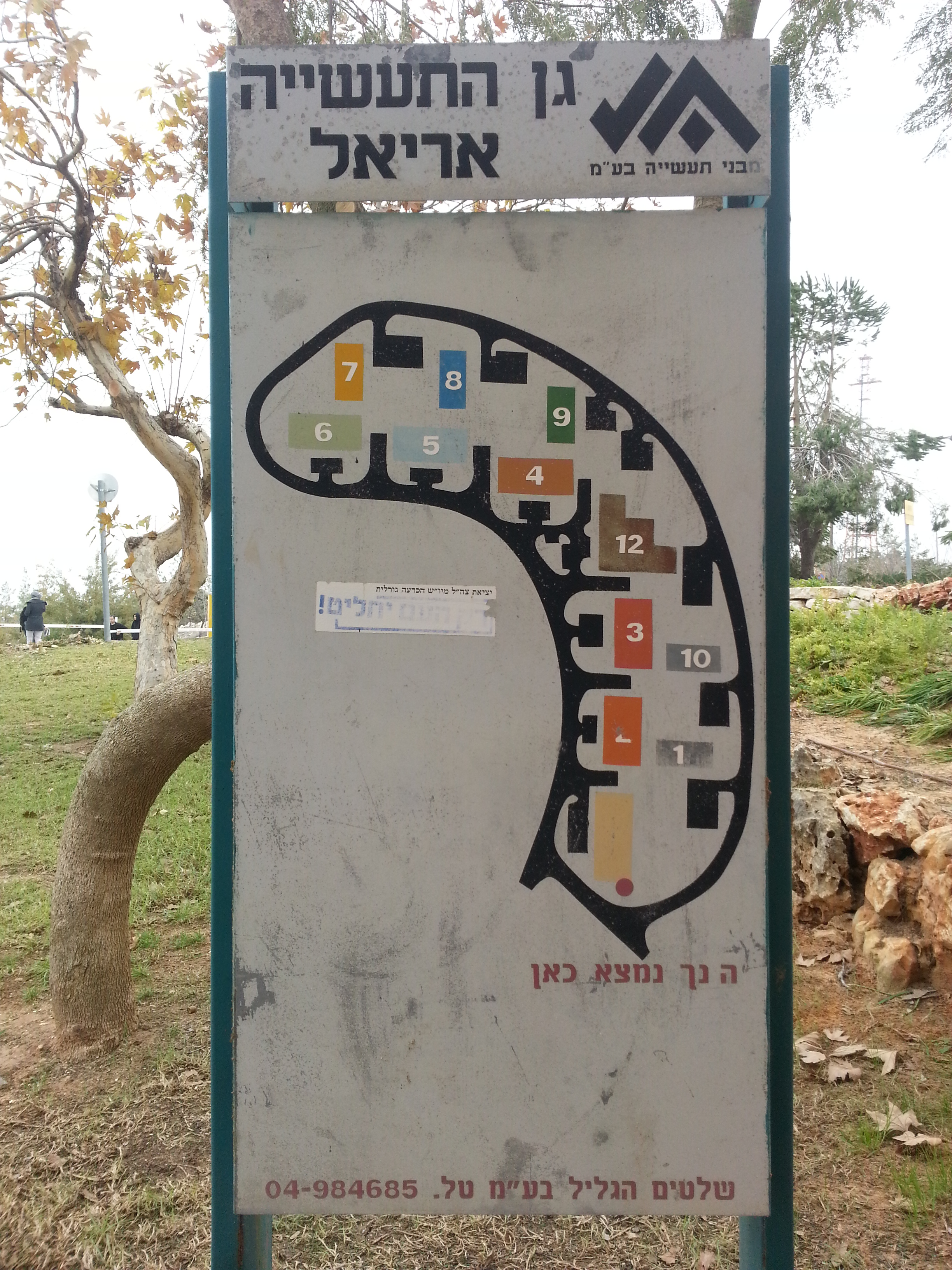 המבנים המשמשים את אוניברסיטת אריאל בשומרון תוכננו תחילה כמבני תעשייה אך, הוסבו לכיתות לימוד טרם החל השימוש בהם